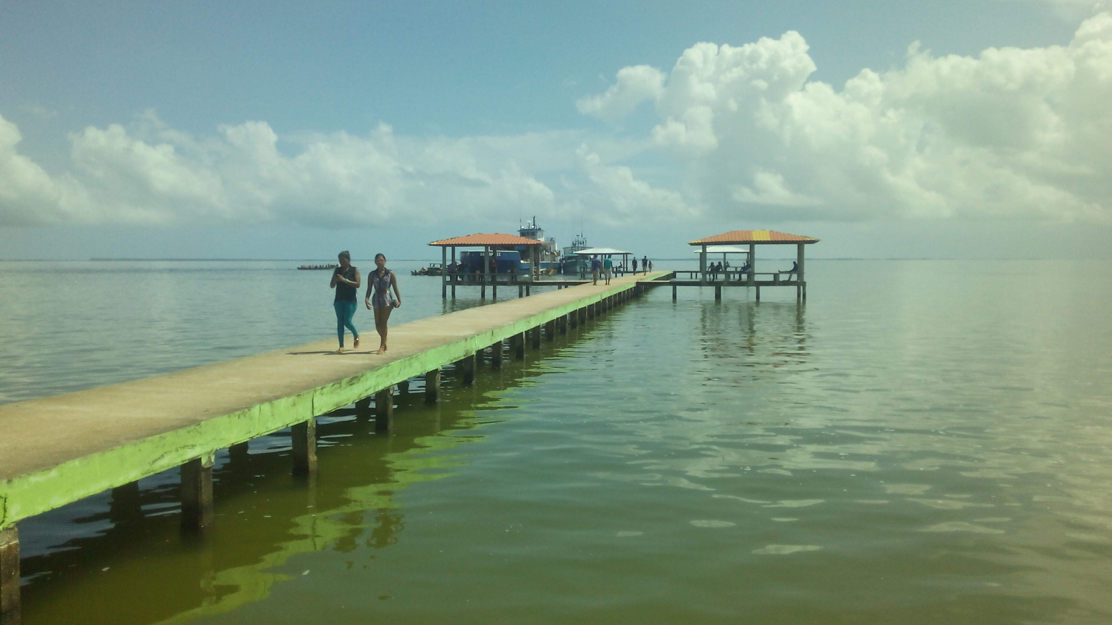 el muelle de puerto lempira, Gracias a Dios